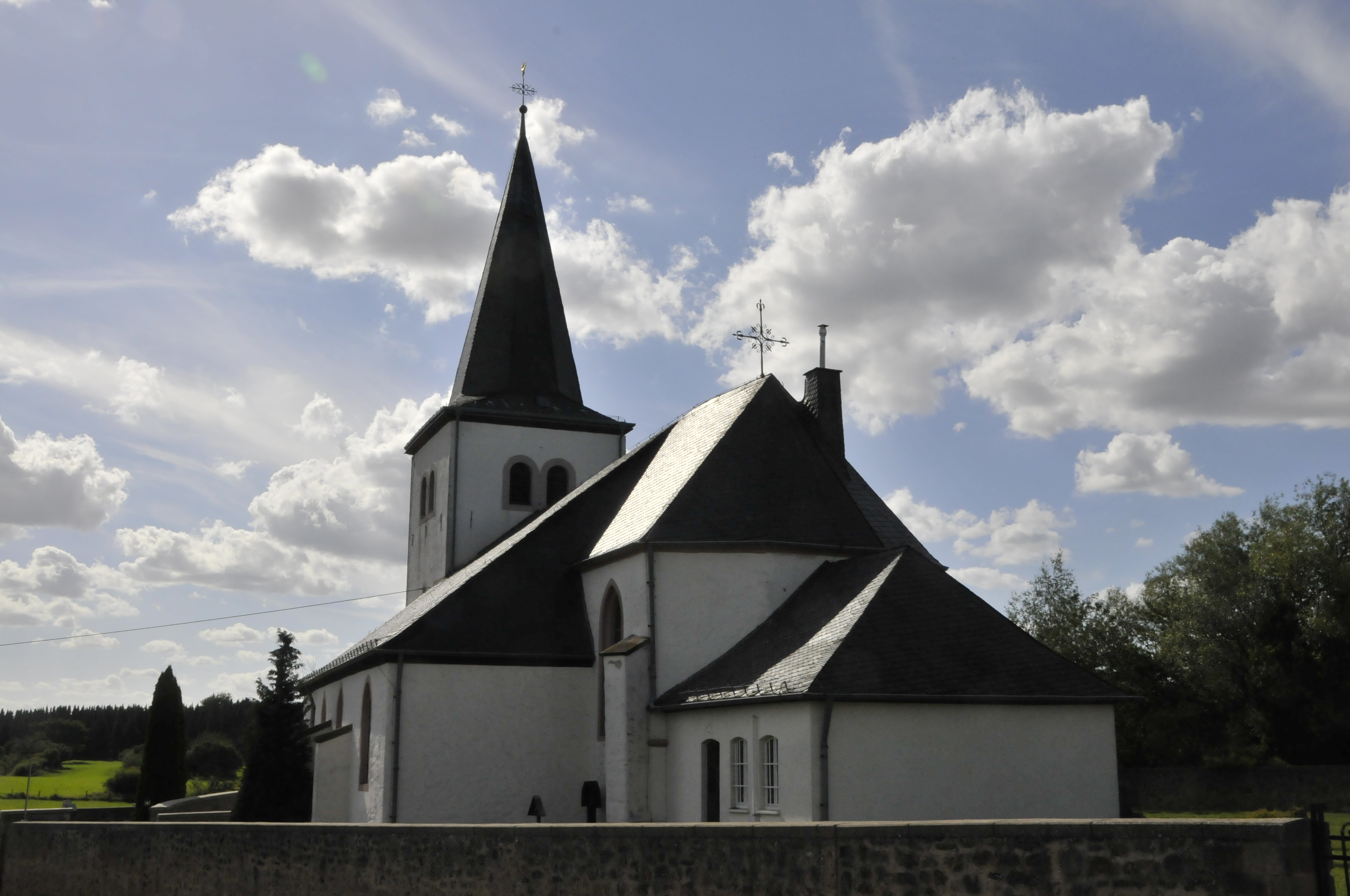 Mechernich, Weyer, Kirche St. Cyriakus